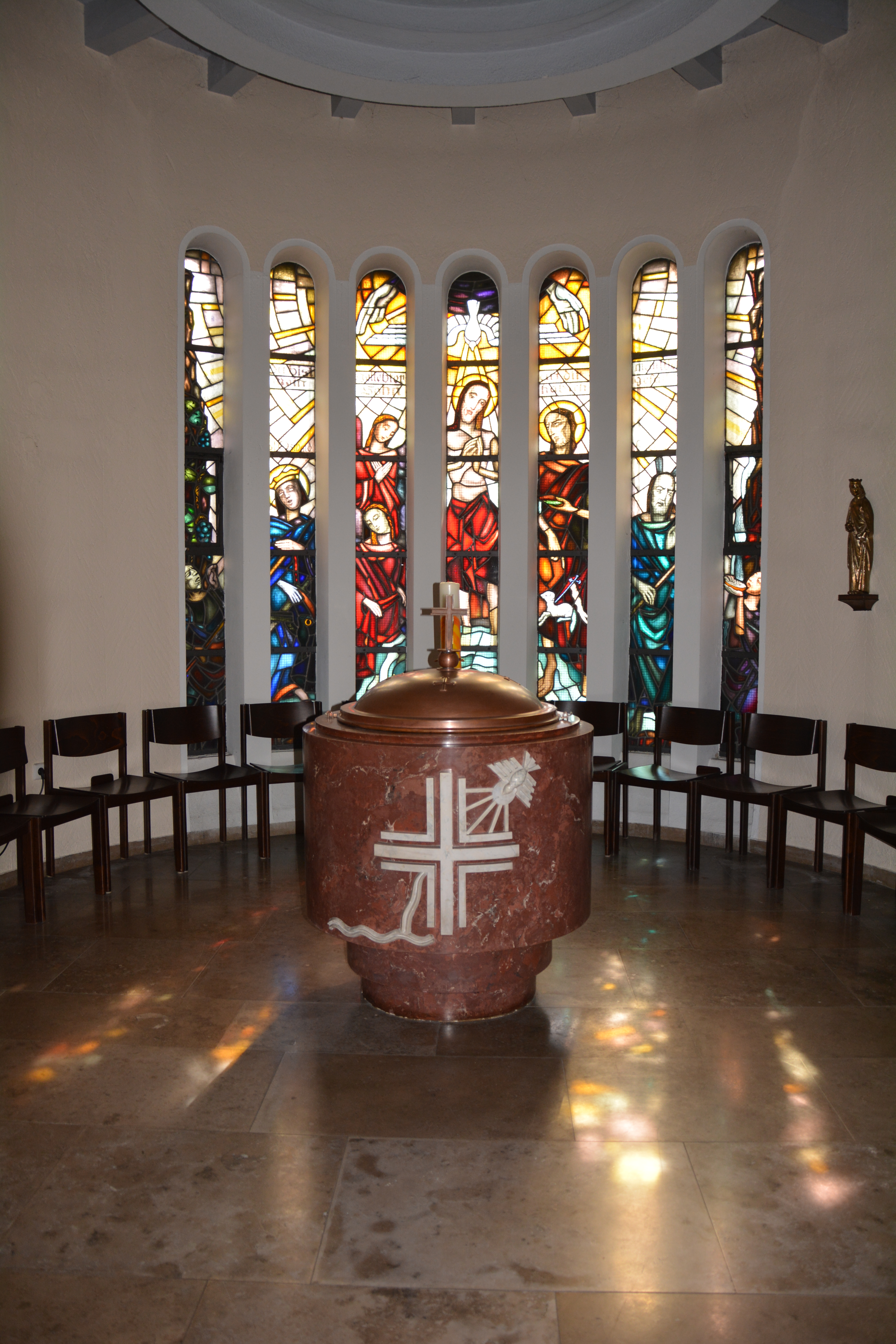 Stockach, Kirche St. Oswald